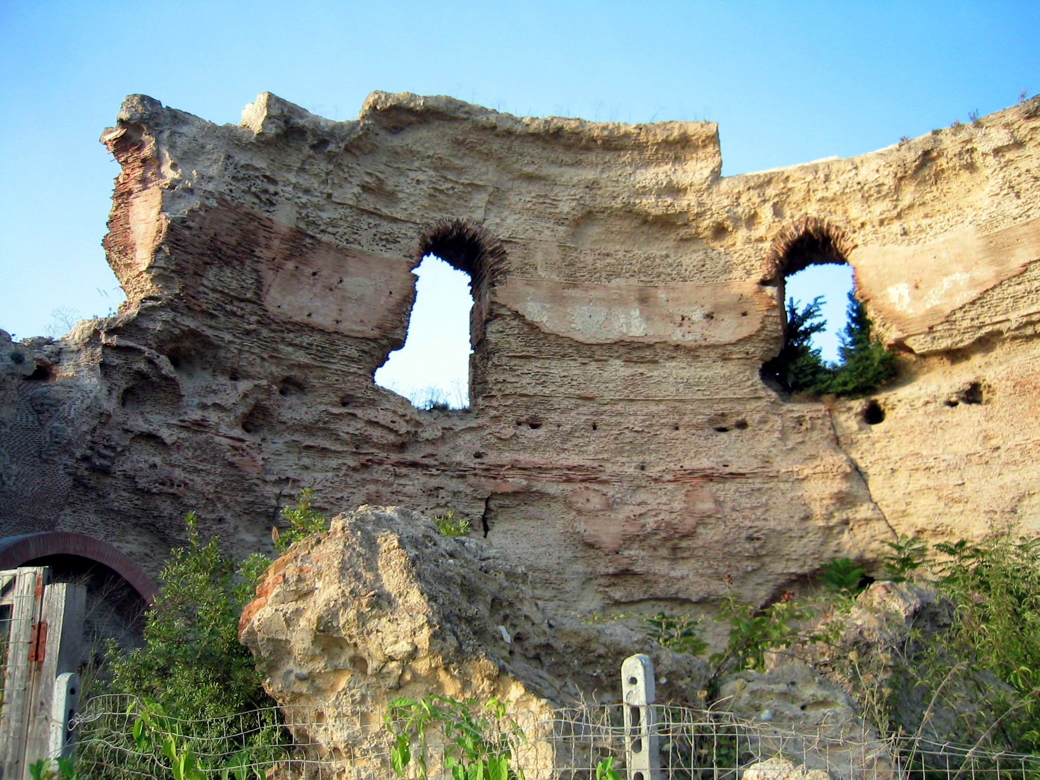 Italy, Campi Flegrei, Lago d'Averno: ruin from a roman therm, called "Tempio di Apollo".